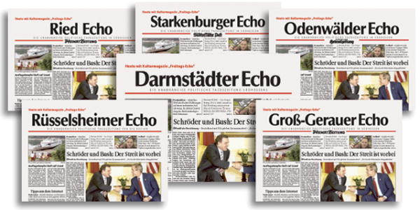 Die Titelblätter der ECHO-Tageszeitungen.